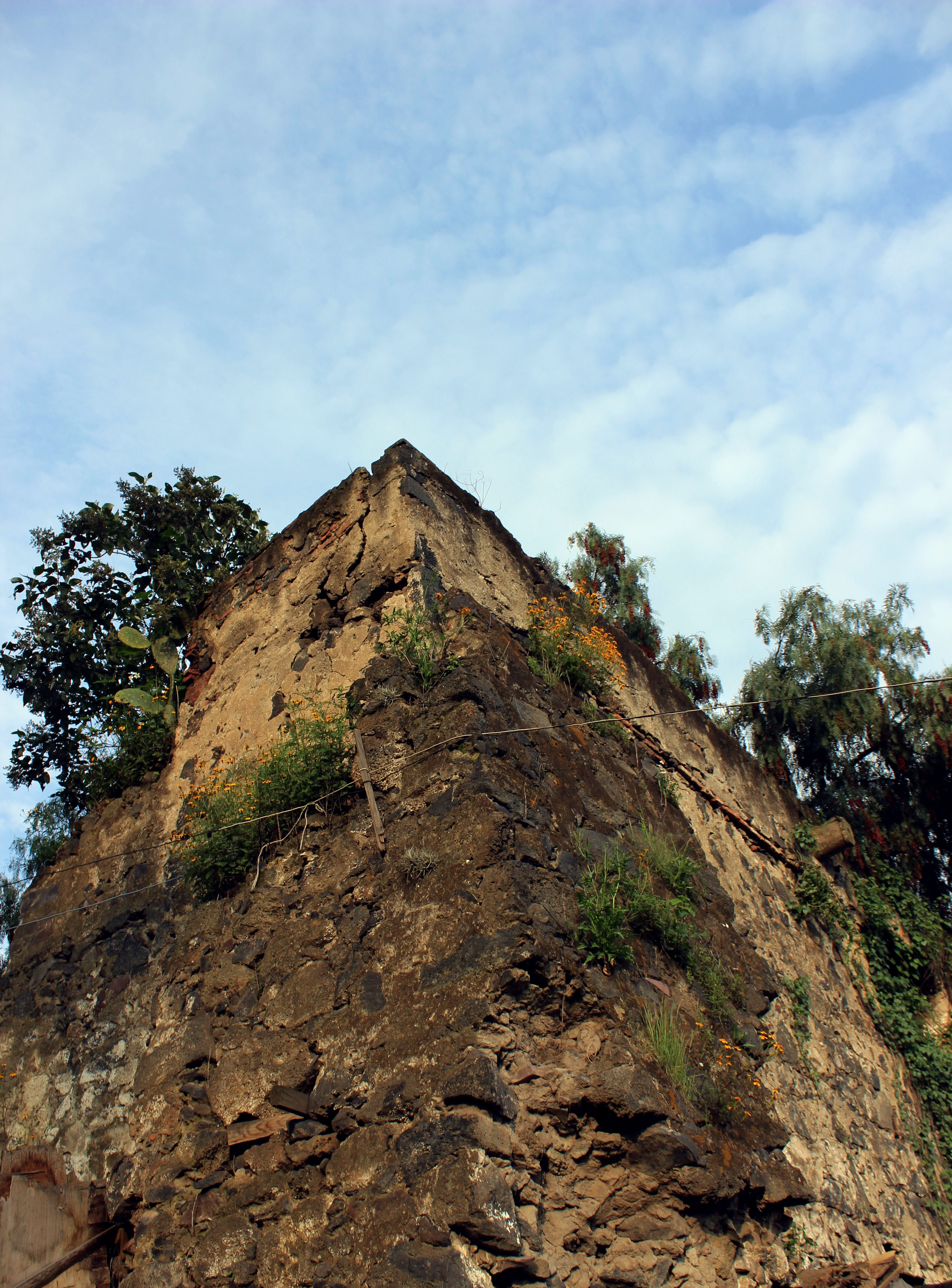 Ruinas de la Antigua Hacienda Santa Fe Tetelco